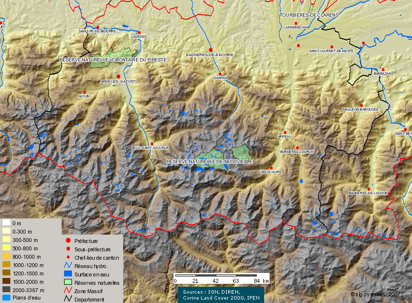 Carte de la zone de la réserve du Néouvielle et de ses nombreux lacs.